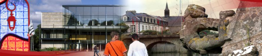 Icônes de la ville de Pontivy